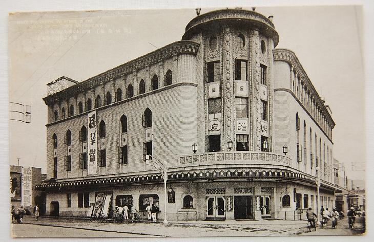 京城府の映画館・劇場、明治座、1937年